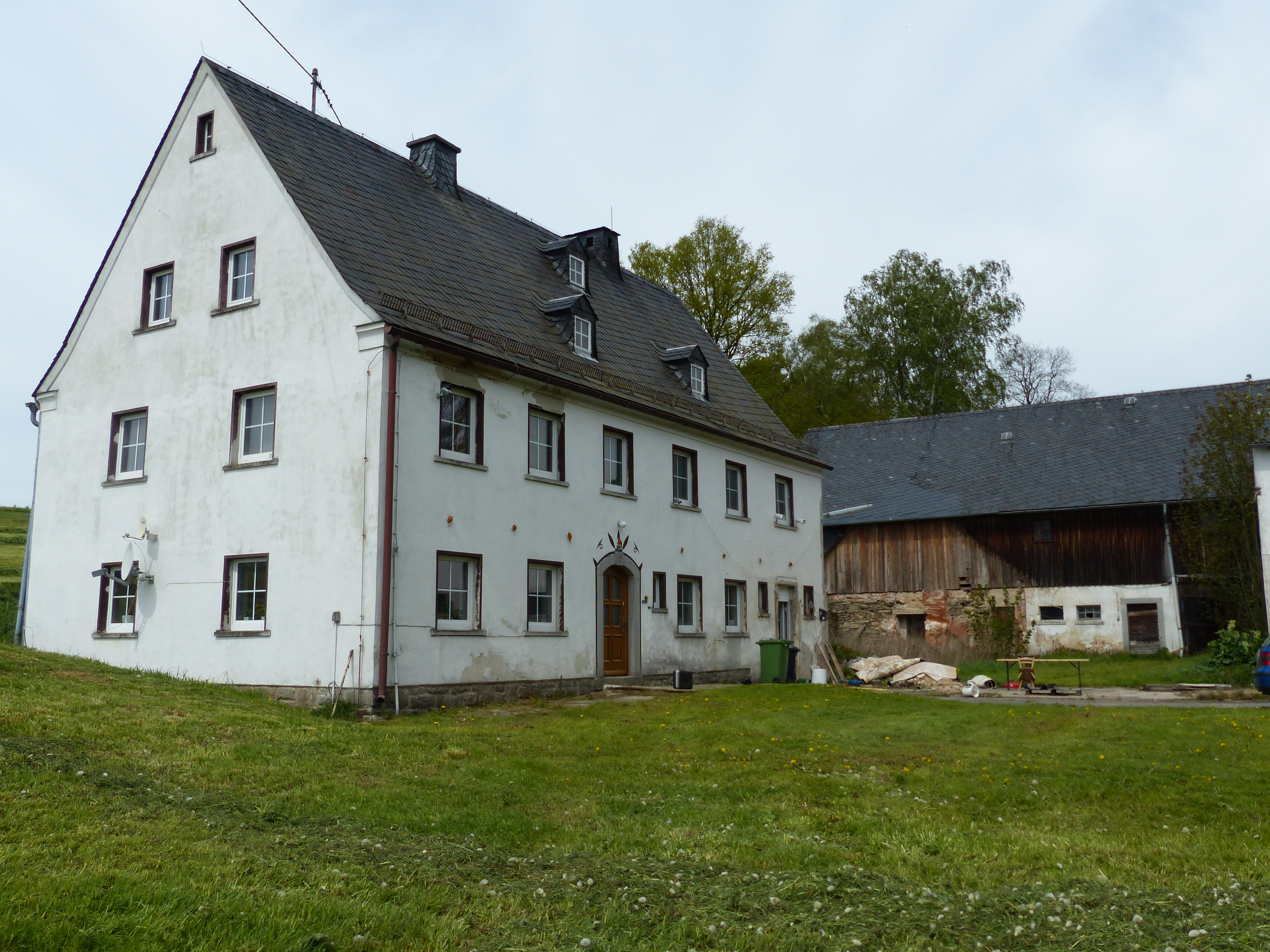 Ansicht von Posterlitz